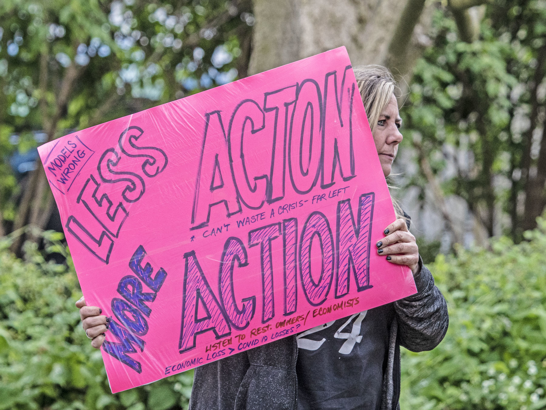 02bIMG_0776